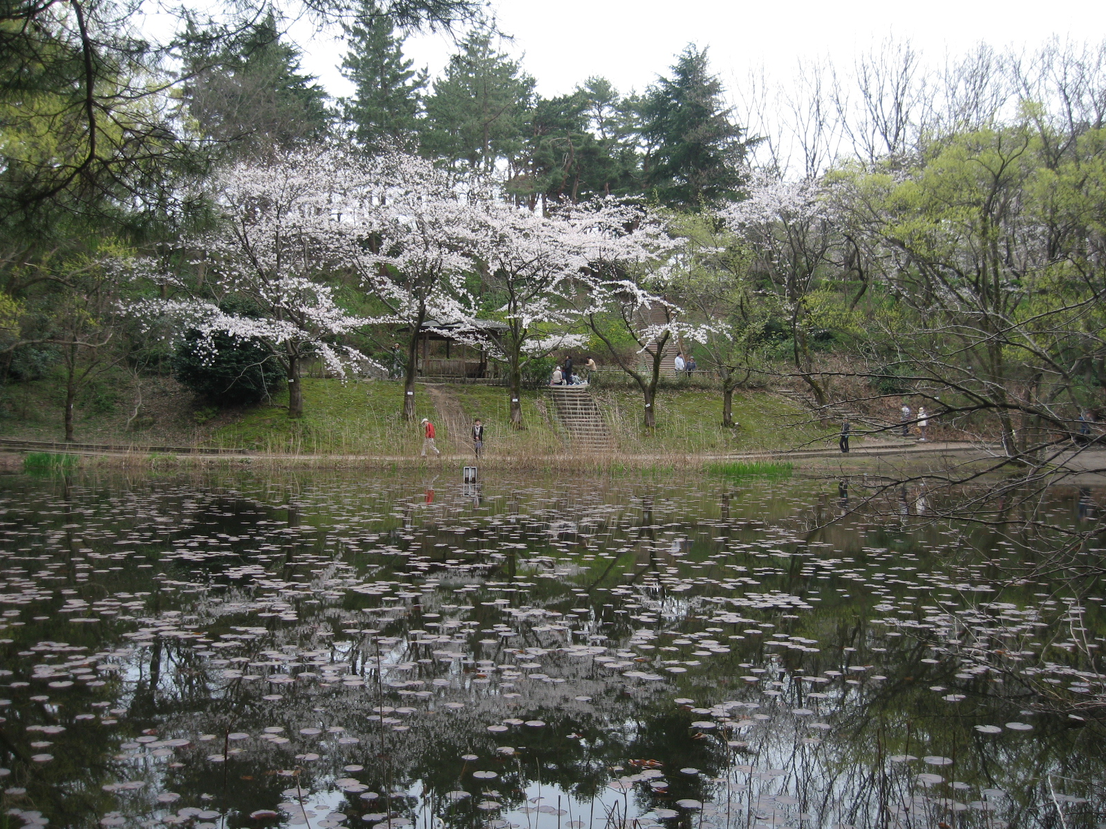 じゅんさい池公園、東池に咲く桜。